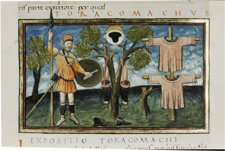 Darstellung d. Ausrüstung eines spätrömischen Soldaten aus der Handschrift De rebus bellici.